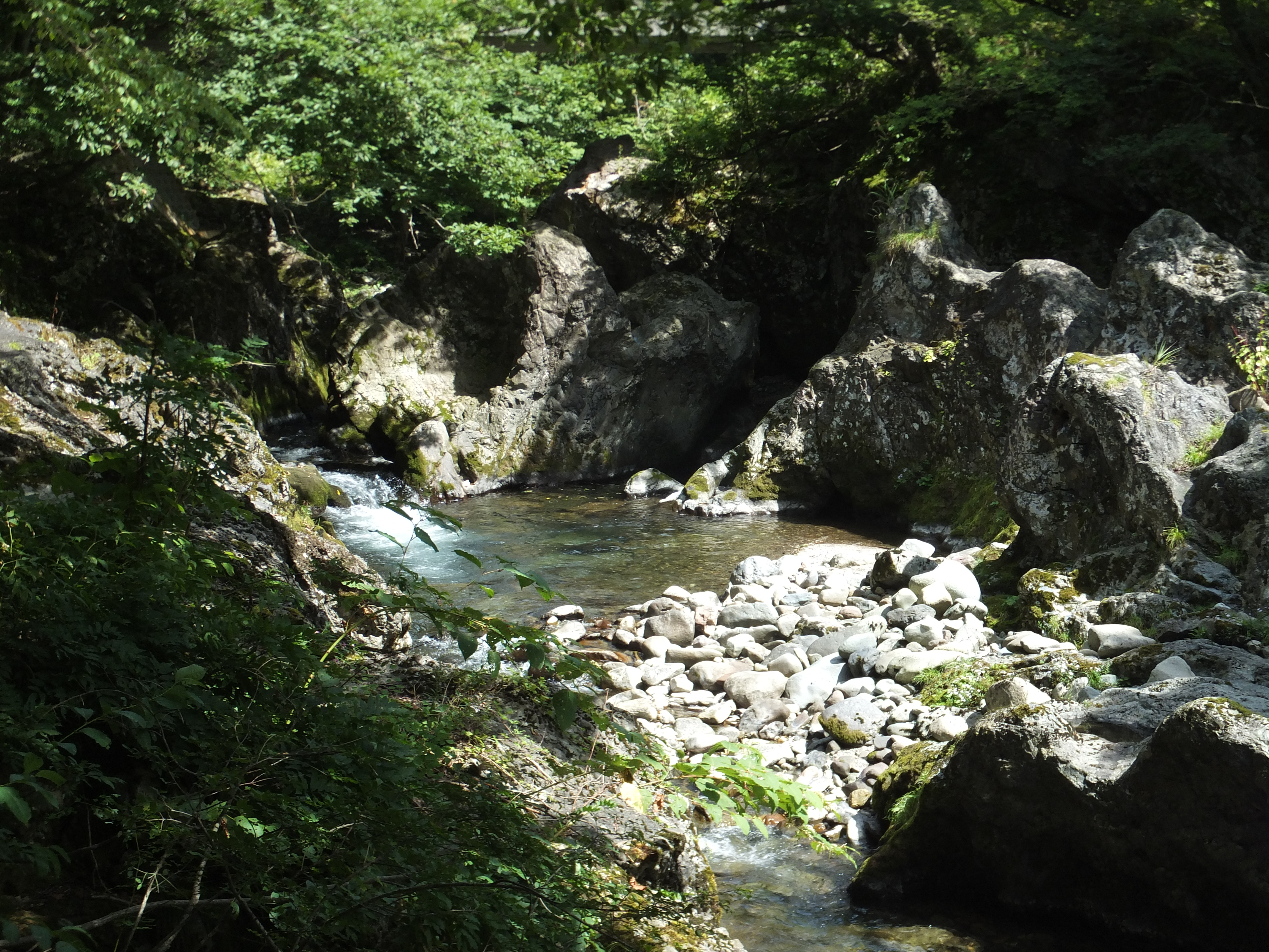 真瀬渓谷 三十釜（秋田県八峰町）